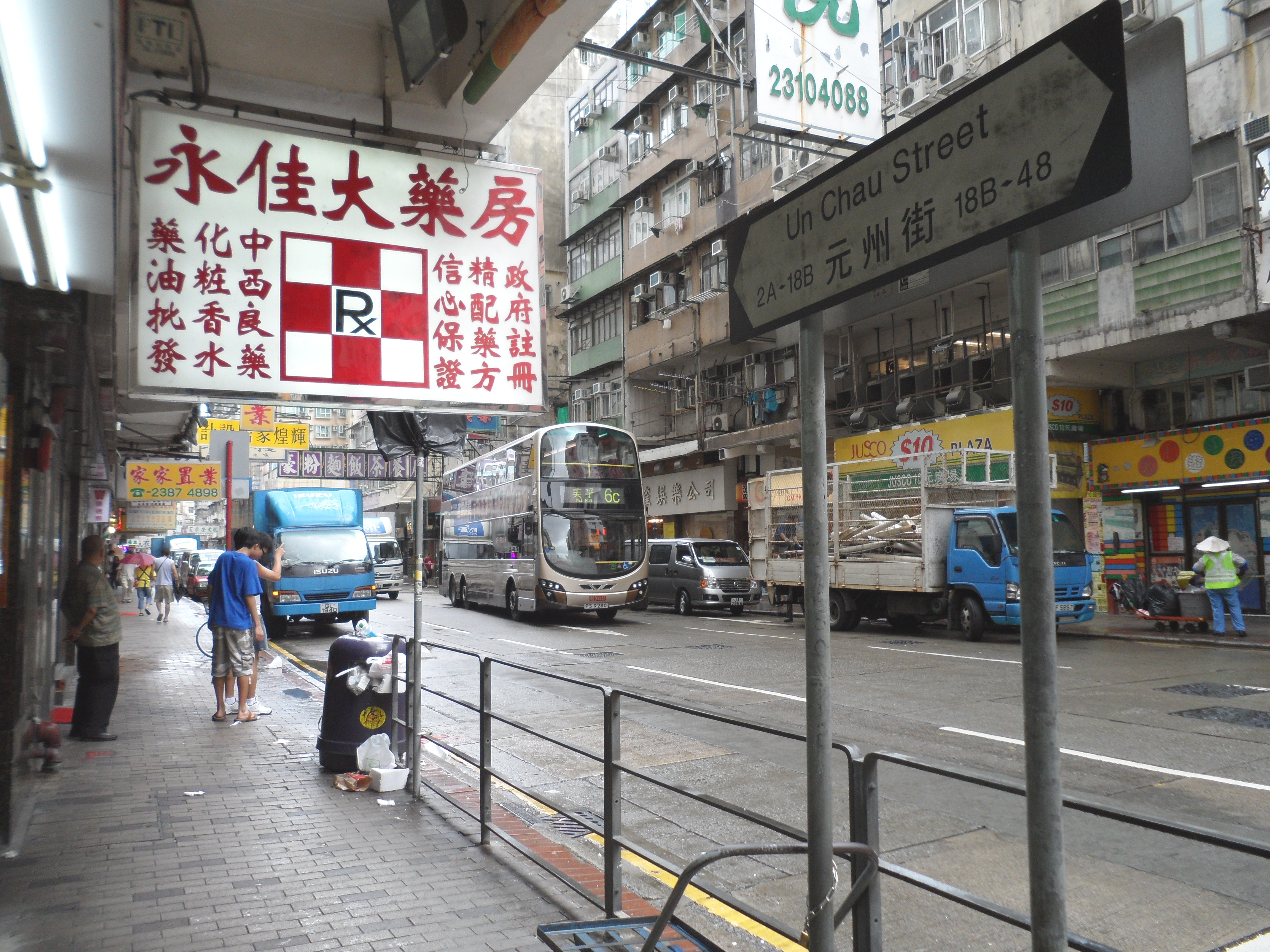 元州街鄰近永佳大藥房